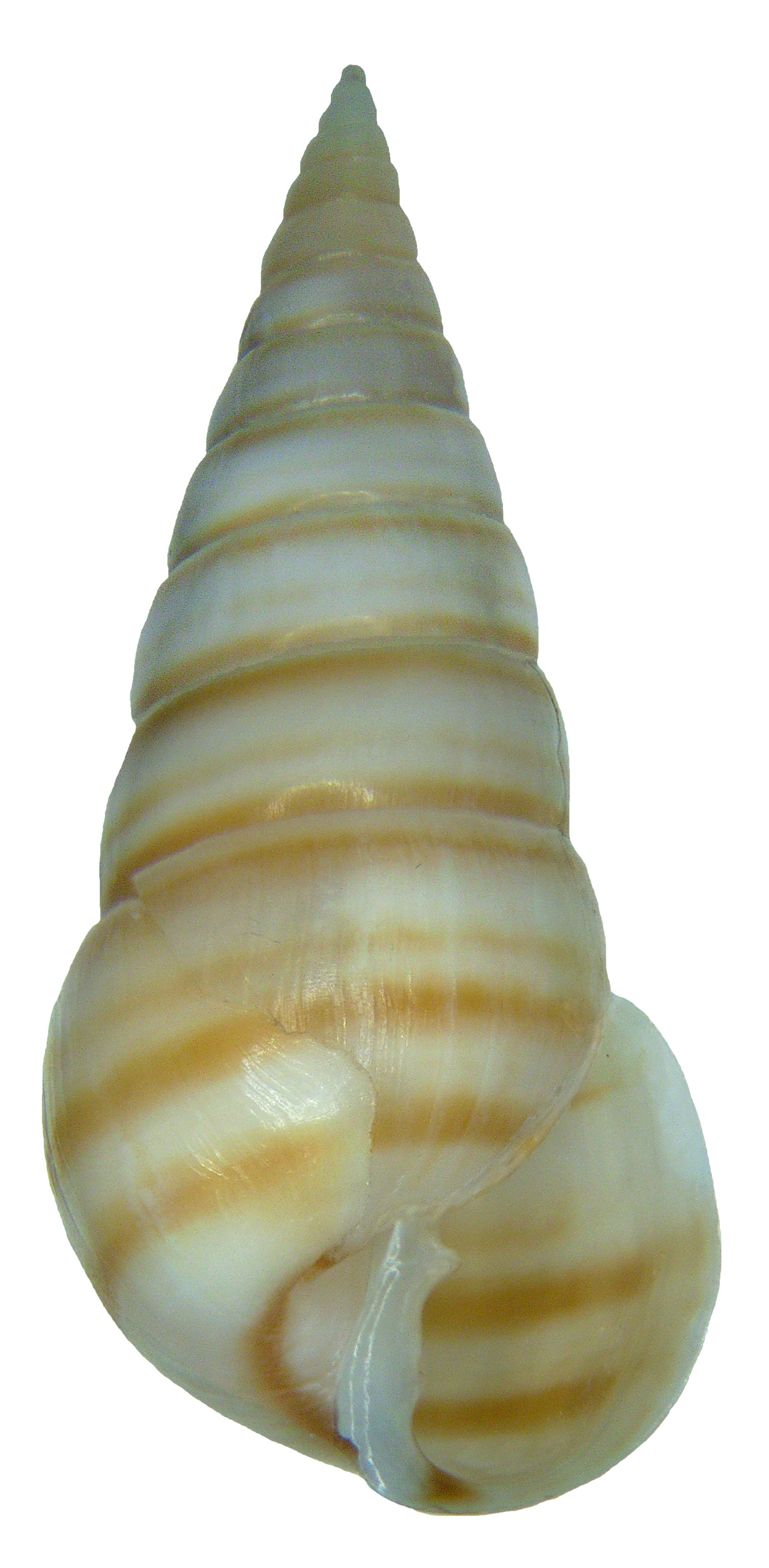 Pyramidella dolabrata (Linnaeus, 1758) ; Familie: Pyramidellidae Grösse. 3 cm Verbreitung: Indopazifik und Karibik Fundort: Dominikanische Republik, Luperon leg.det. U.Schmidt, 1989 Foto: U.Schmidt, 2008